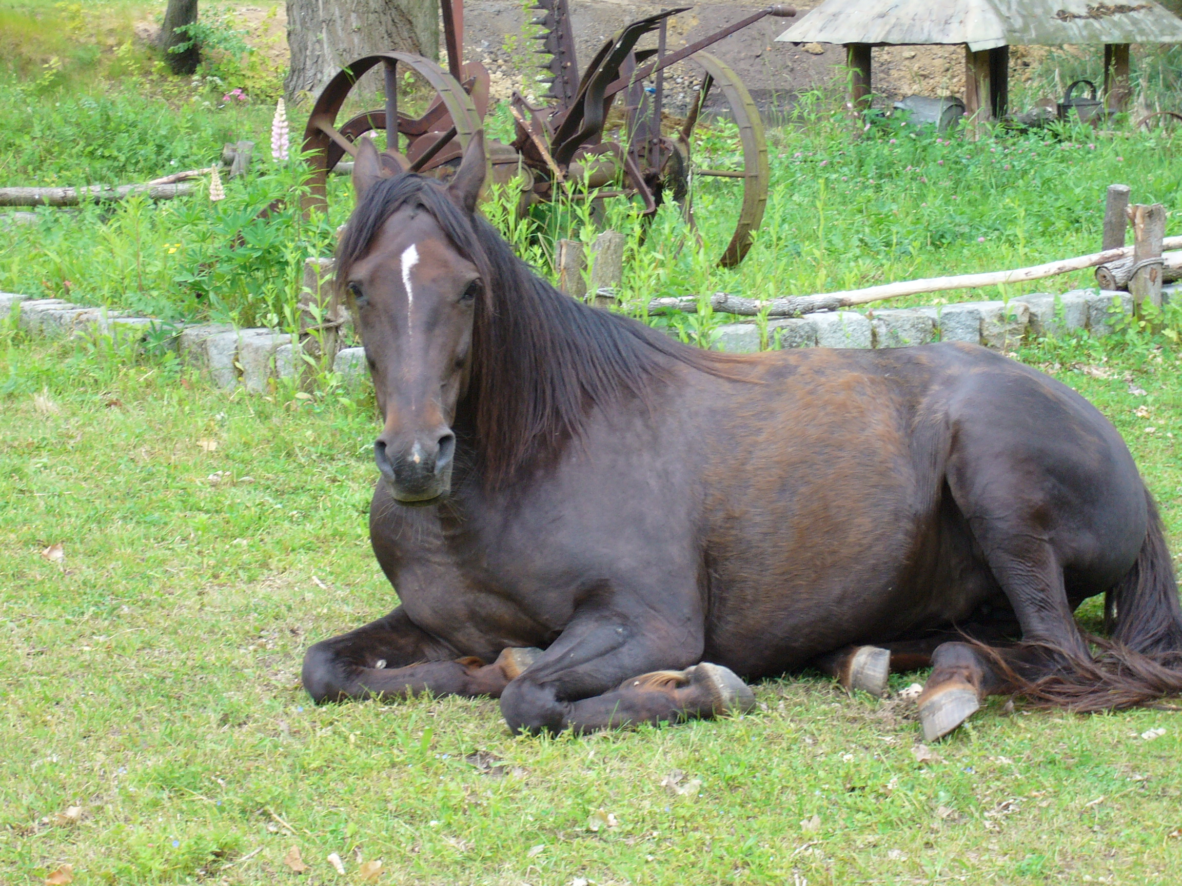 strzałka odmiana na głowie konia